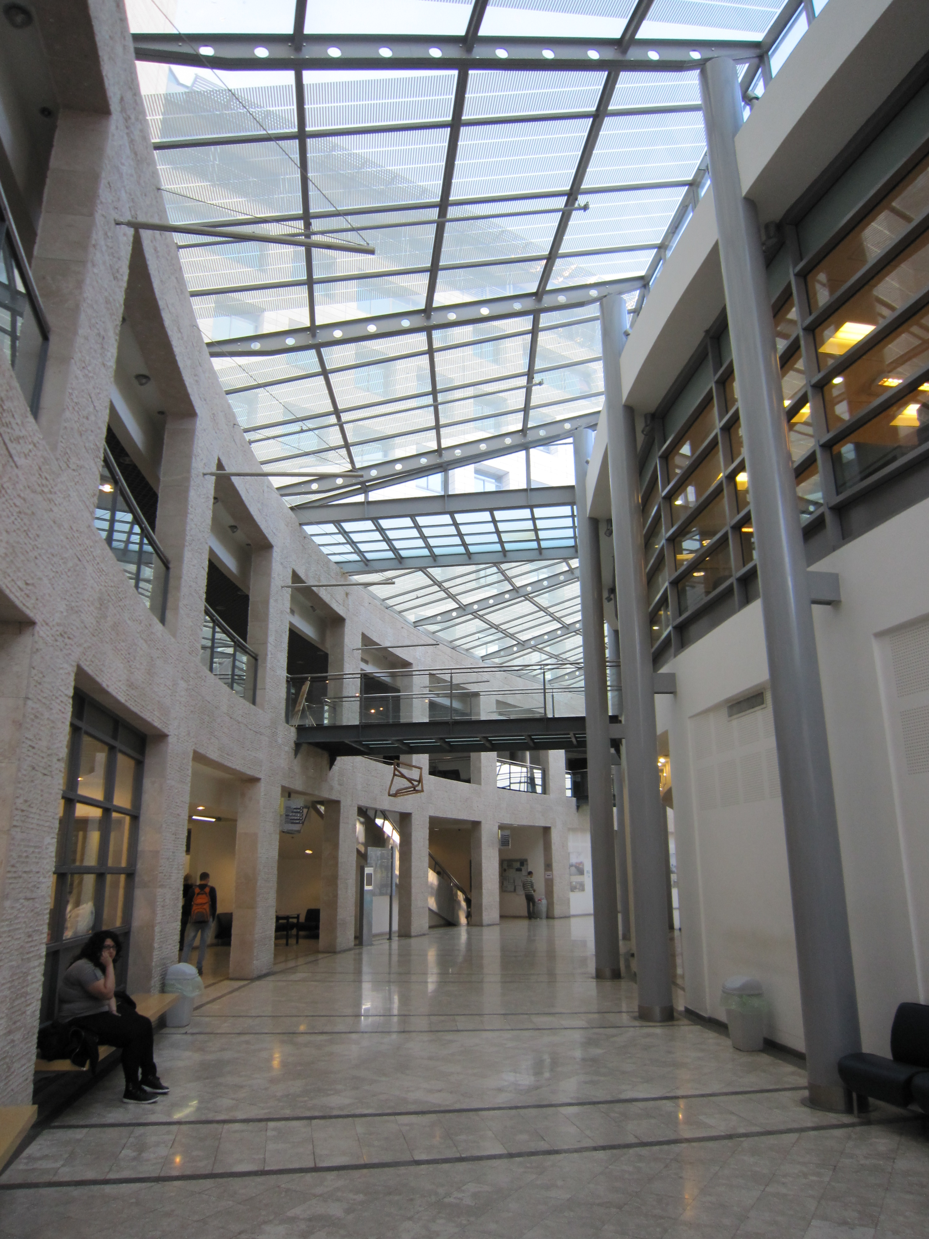 בניין הפקולטה למדעי המחשב